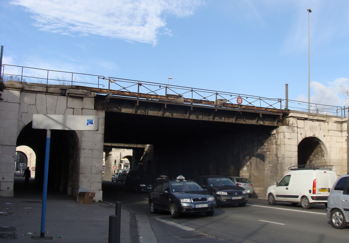 Le pont portant les voies d'entrée dans la gare du Prado au-dessus du boulevard Rabatau, quartier Menpenti (Marseille 10e arr.)